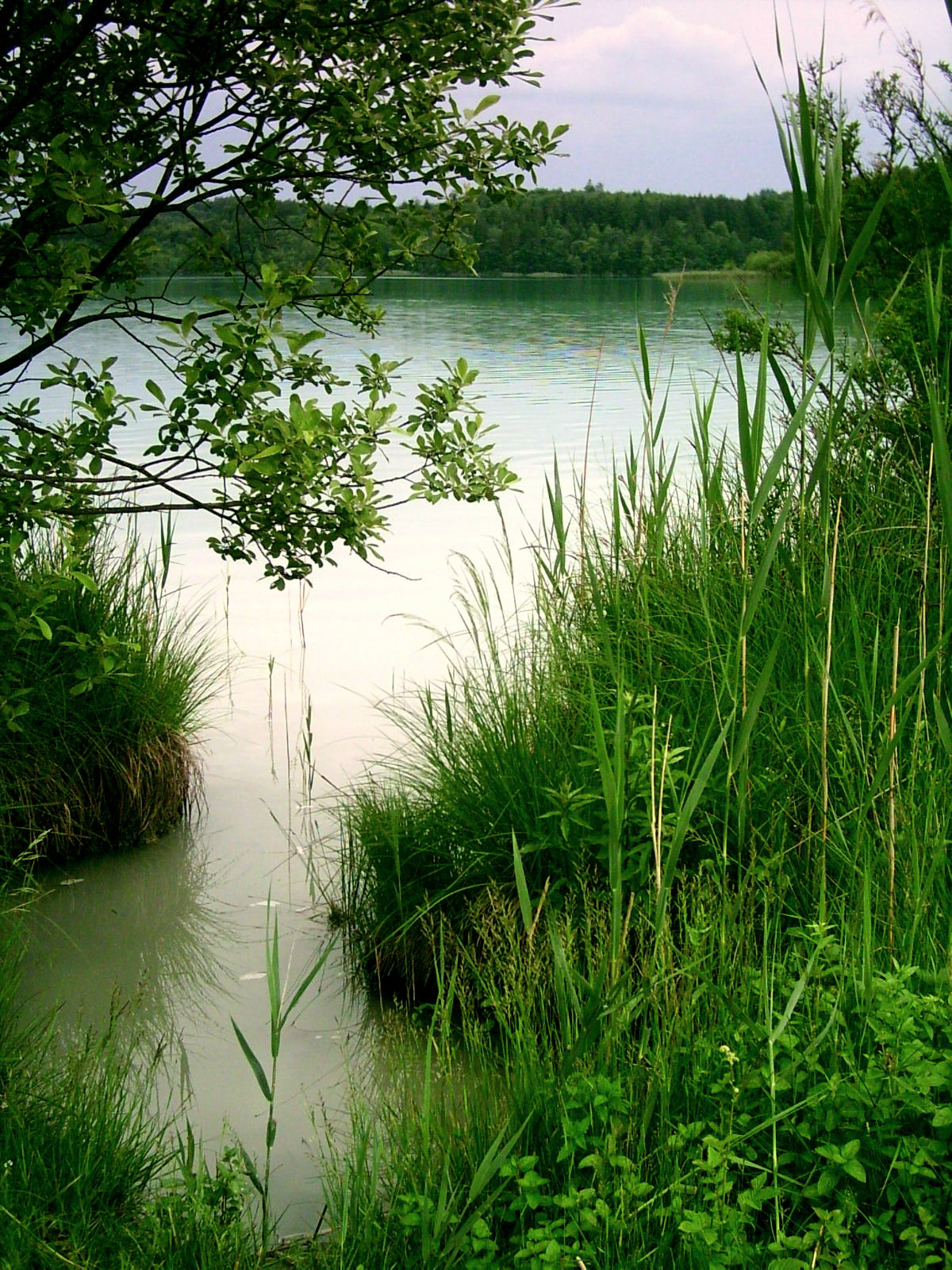 Großer Ostersee, Osterseen, Bayern, Germany